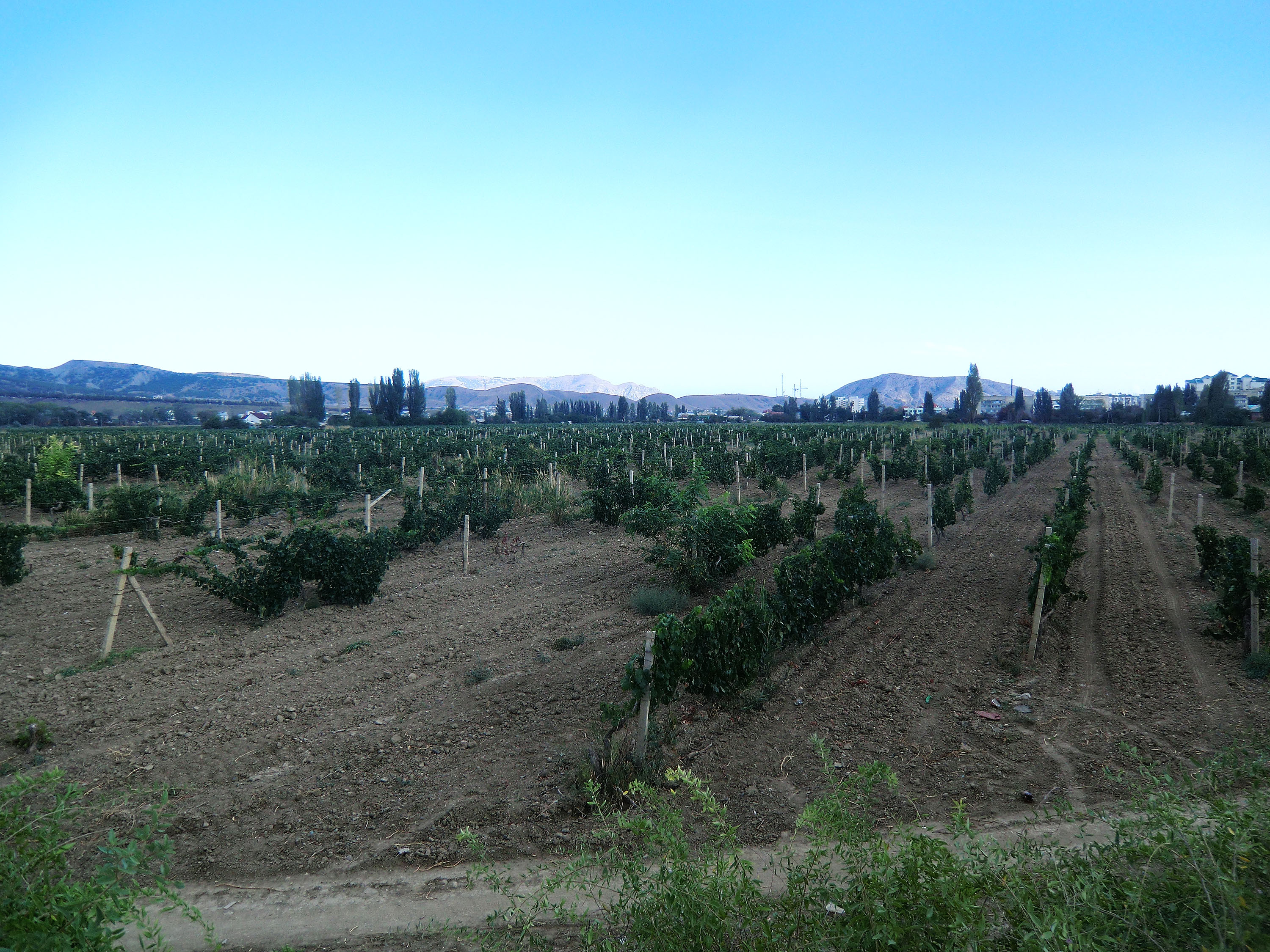 Виноградники винодельческого предприятия «Судак» (ГП «Судак») входящего в состав НПАО «Массандра»